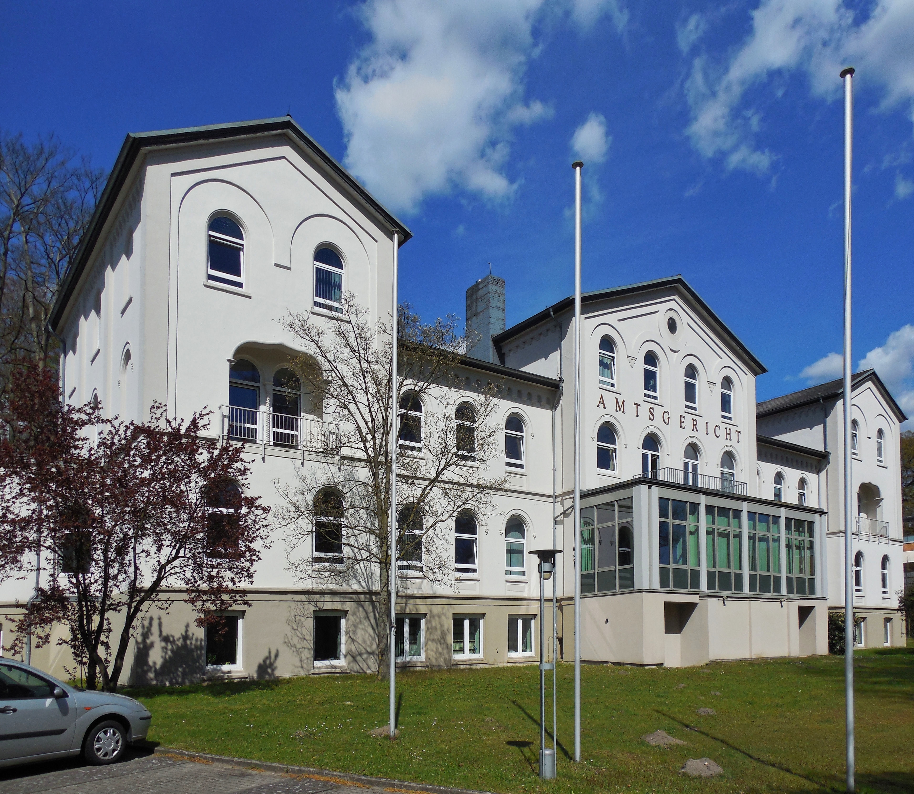 Amtsgericht